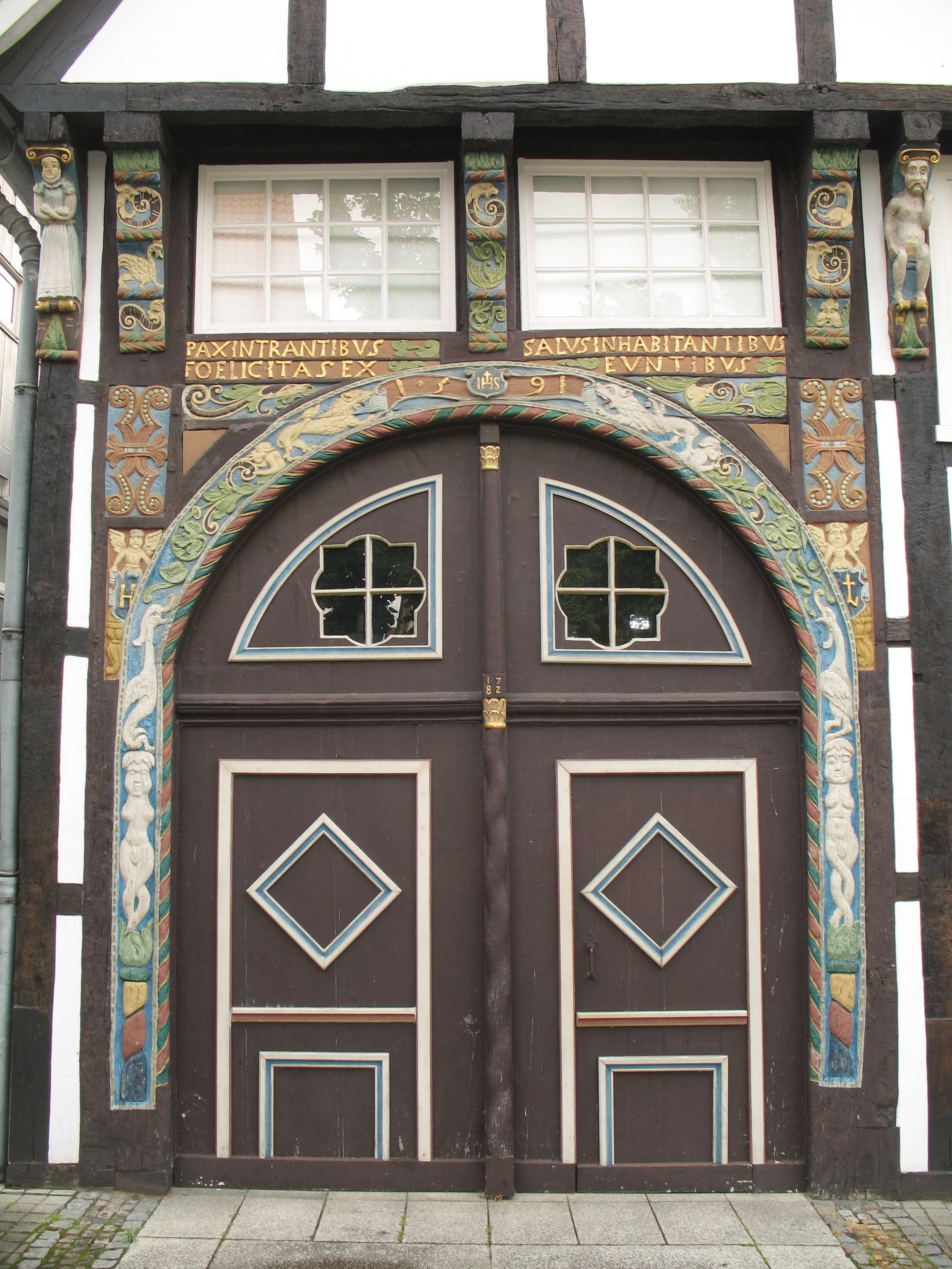 Wiedenbrück, altes Heimatmuseum (bis 2008), Tor